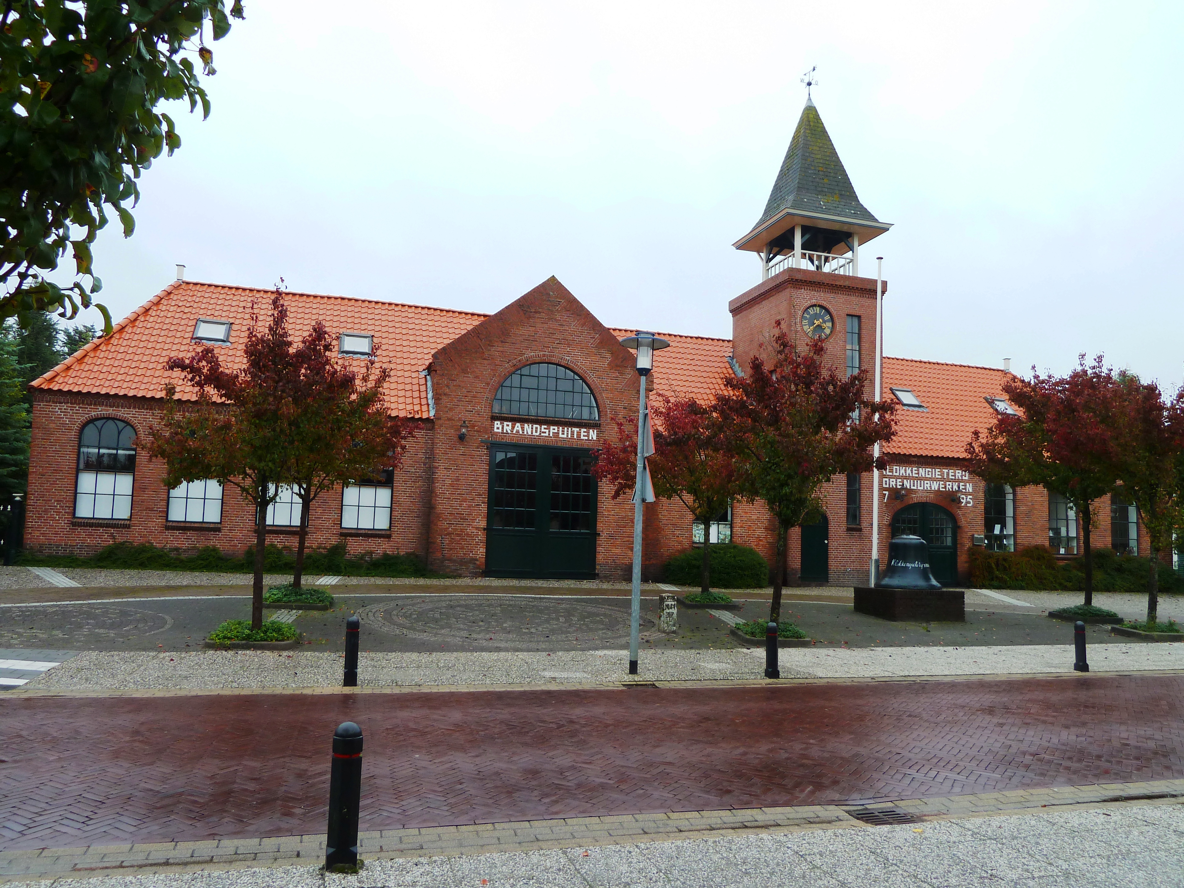 Klokkengieterijmuseum Heiligerlee (Groningen, Nederland) Deze voormalige klokkengieterij Sint-Paulinus van Van Bergen werd in 1862 opgericht in het dorp, maar was daarvoor vanaf 1795 al actief in Midwolda. In 1980 ging de fabriek failliet, tussen 1985 en 1987 werd deze gerestaureerd en vervolgens heropend als museum. Het torentje droeg vroeger geen spits, maar een carillon.